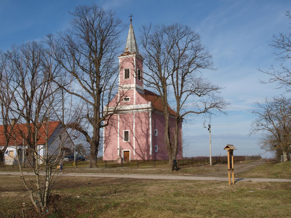 Crkva u selu Klakar, koje se nalazi u Brodsko-posavskoj županiji.